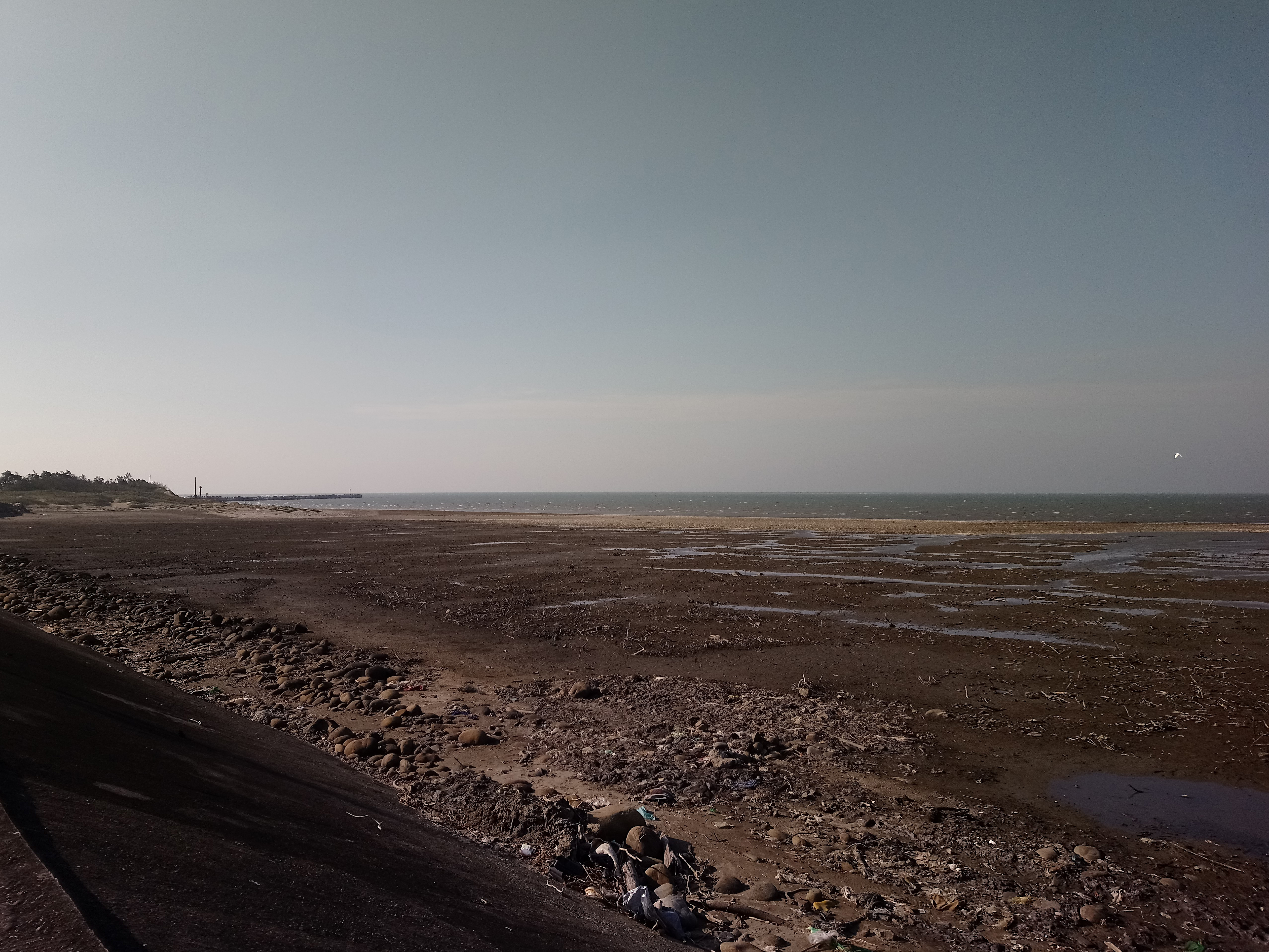 退潮時的香山濕地,台灣省新竹市香山區香山聯里朝山里